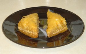 Typical Baklava